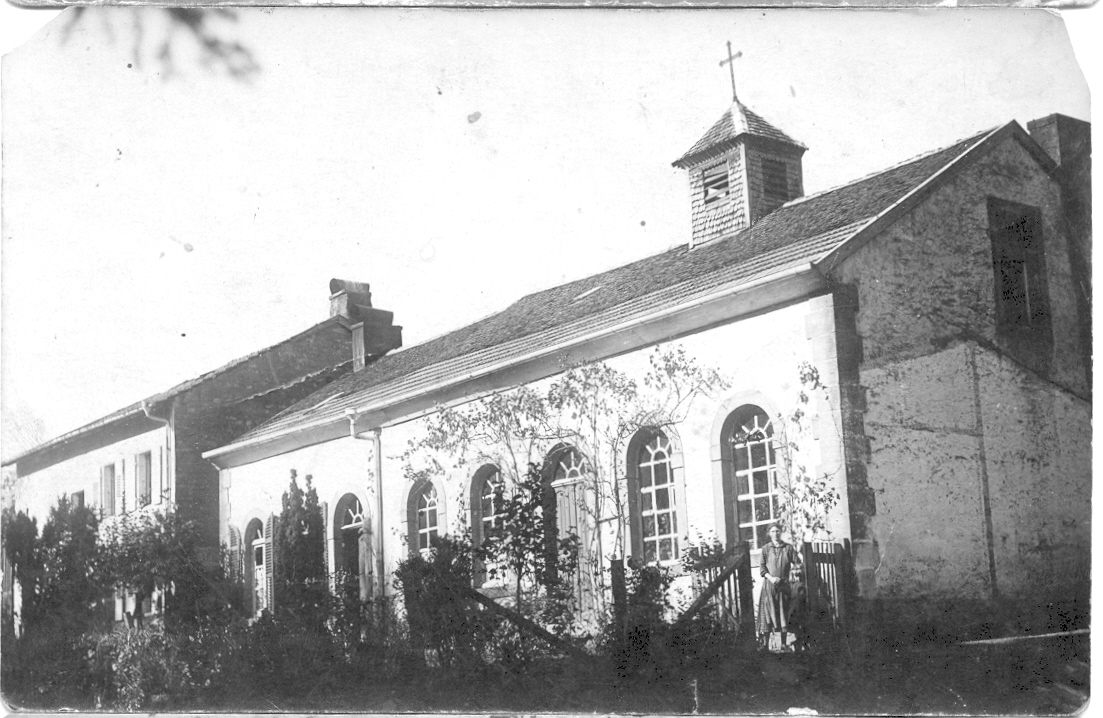 En 1920: entrée du temple sur le côté, nouvelle entrée sur le pignon pas encore réalisée, la moitié supérieure du toit et le clocheton recouvert de bardeaux.